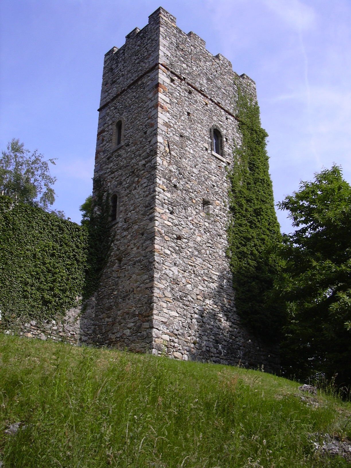 Rocca medioevale sita nel comune di Orino, provincia di Varese, all'interno del Parco regionale Campo dei Fiori.